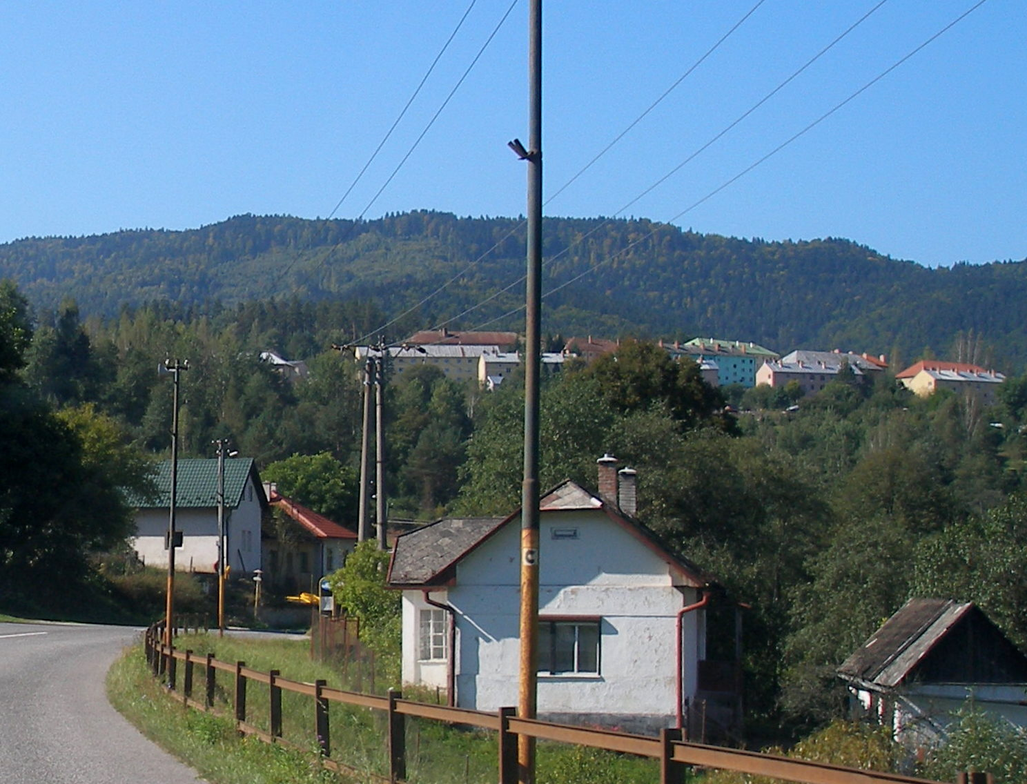 Spišská obec Prakovce. Okres Gelnica.